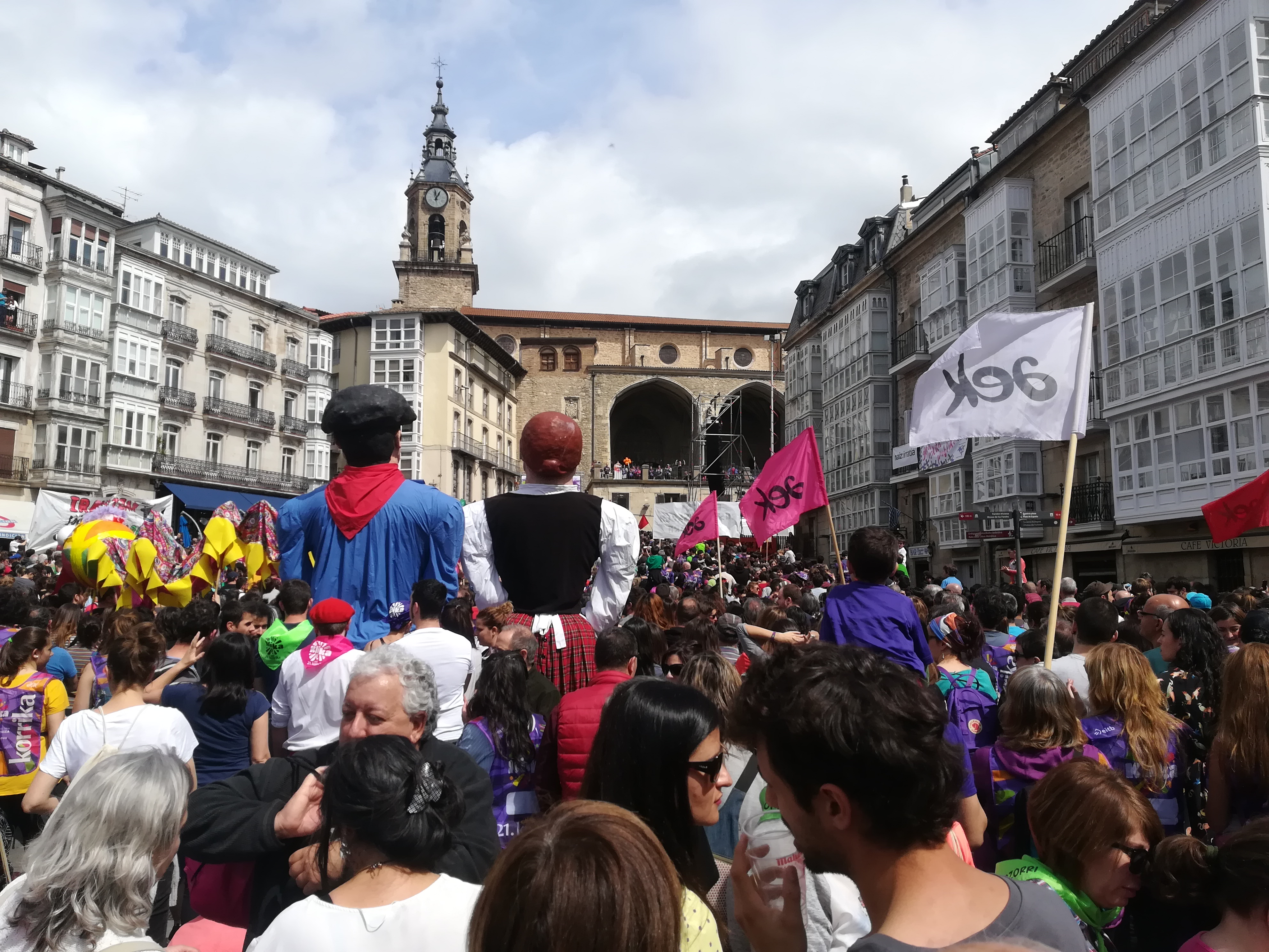 21. KORRIKA Gasteizen, amaiera ekitaldia Andre Maria Zuriaren plazan.